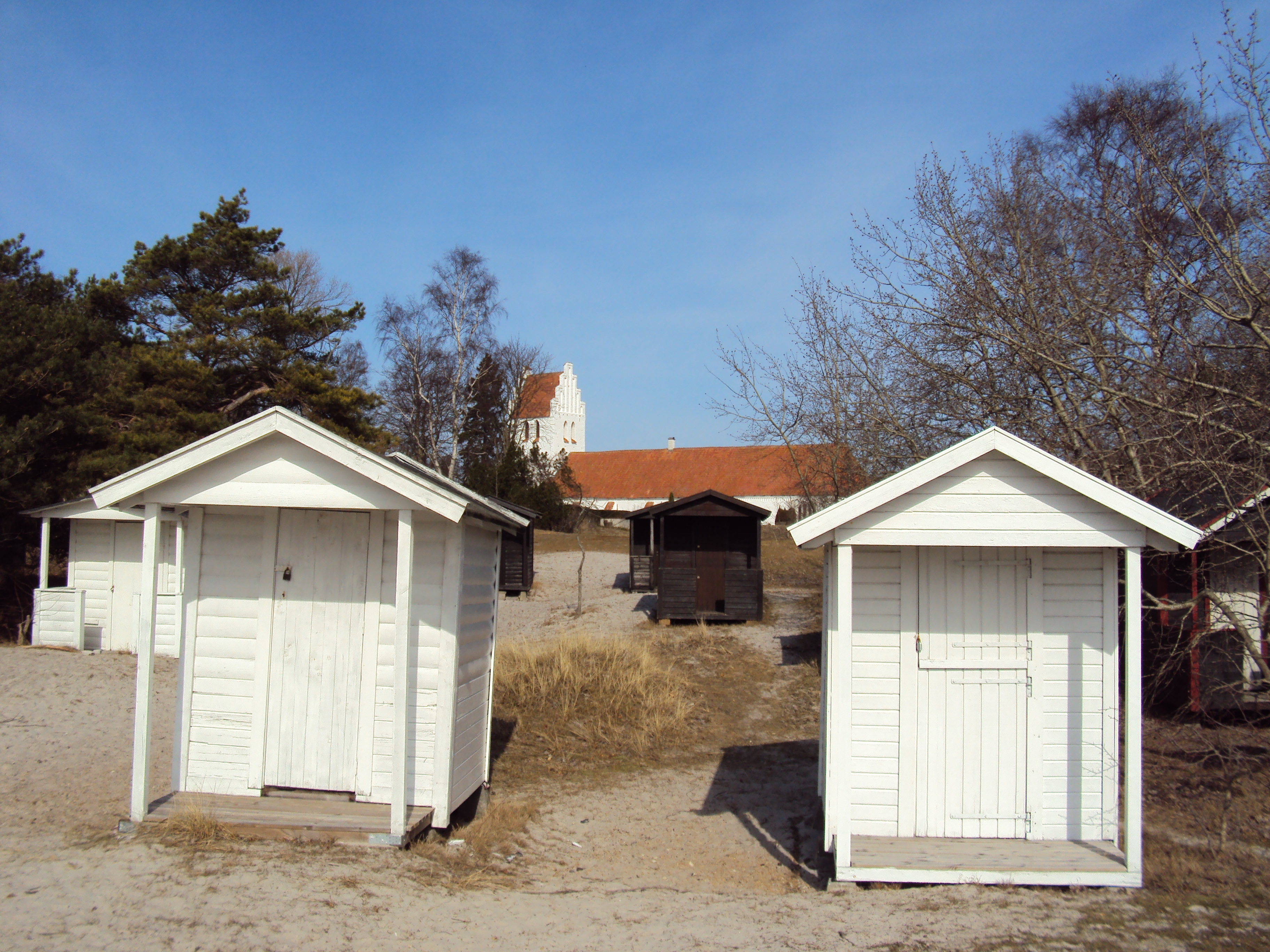 Badhyttar i Falsterbo med kyrkan i bakgrunden